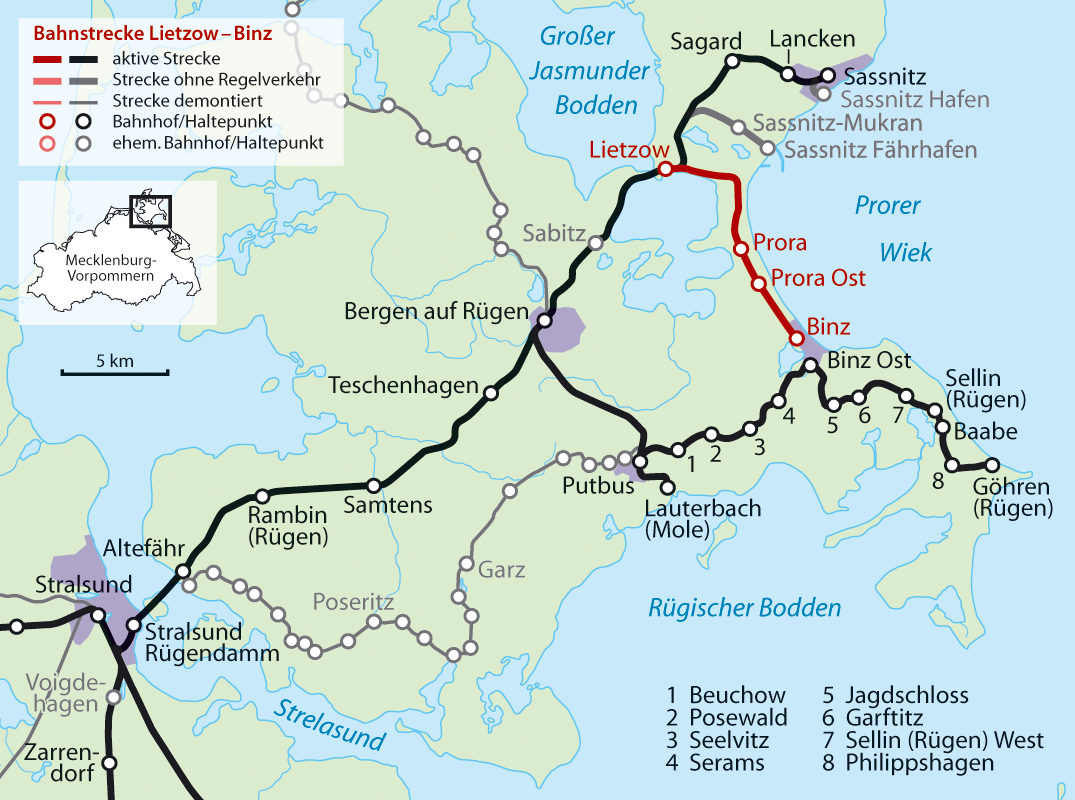 Karte der Bahnstrecke Lietzow–Binz